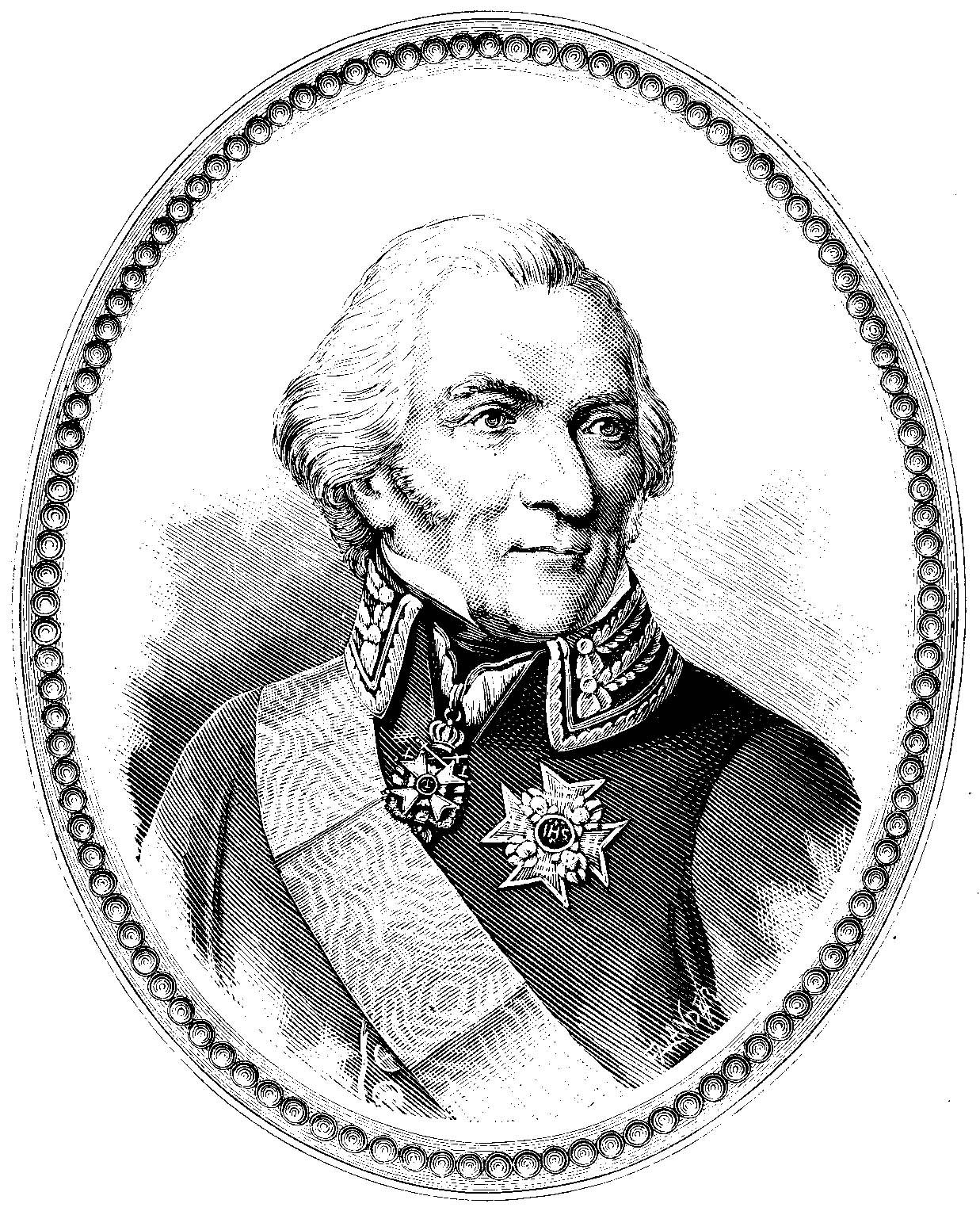 Johan Christopher Toll, generalguvernör över Skåne. Bild ur planschverket Femtio porträtt af ryktbara svenskar (sent 1800-tal)